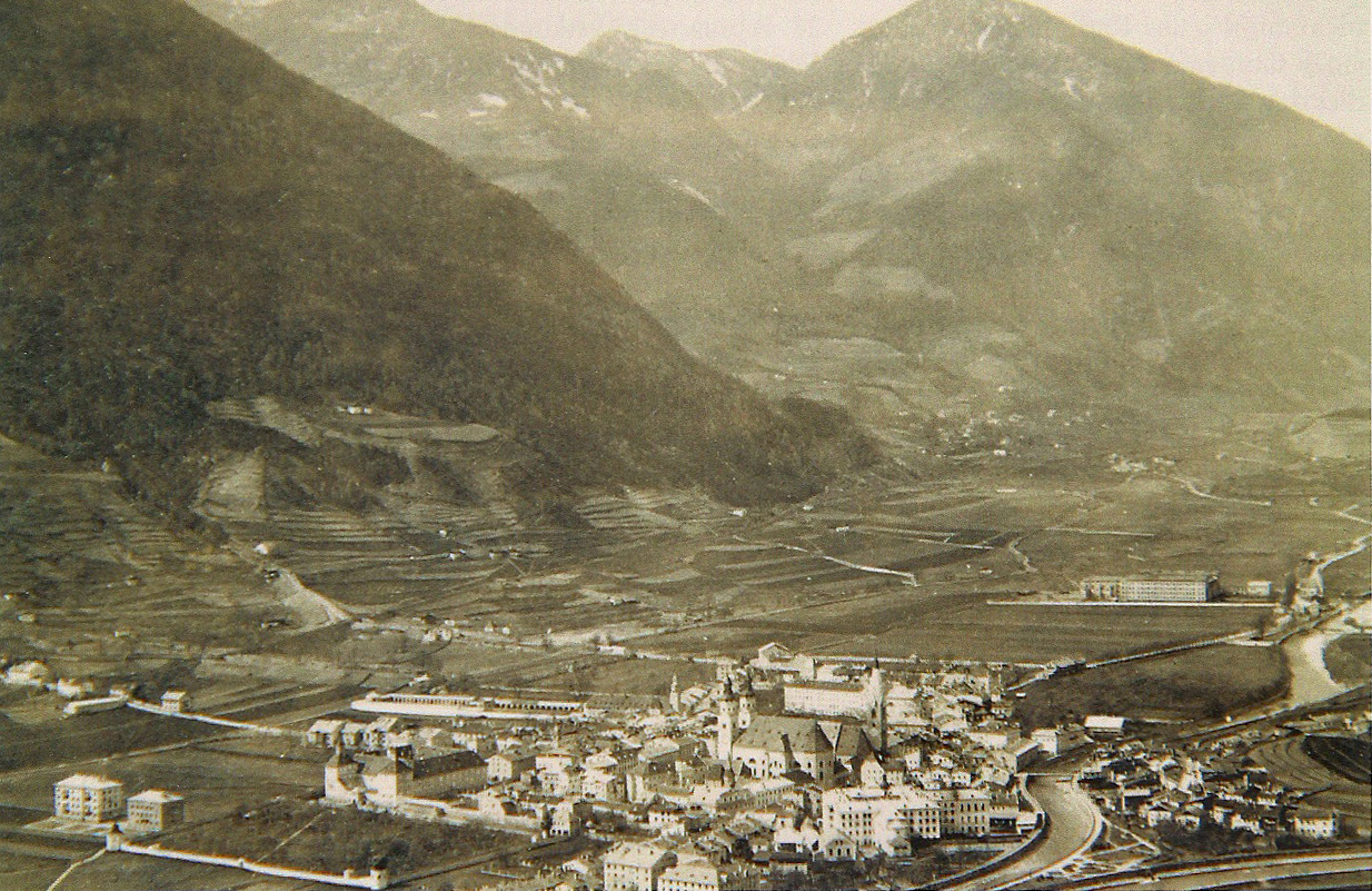 Eine historische Fotografie von Brixen mit dem neu gebauten Vinzentinum in Hintergrund